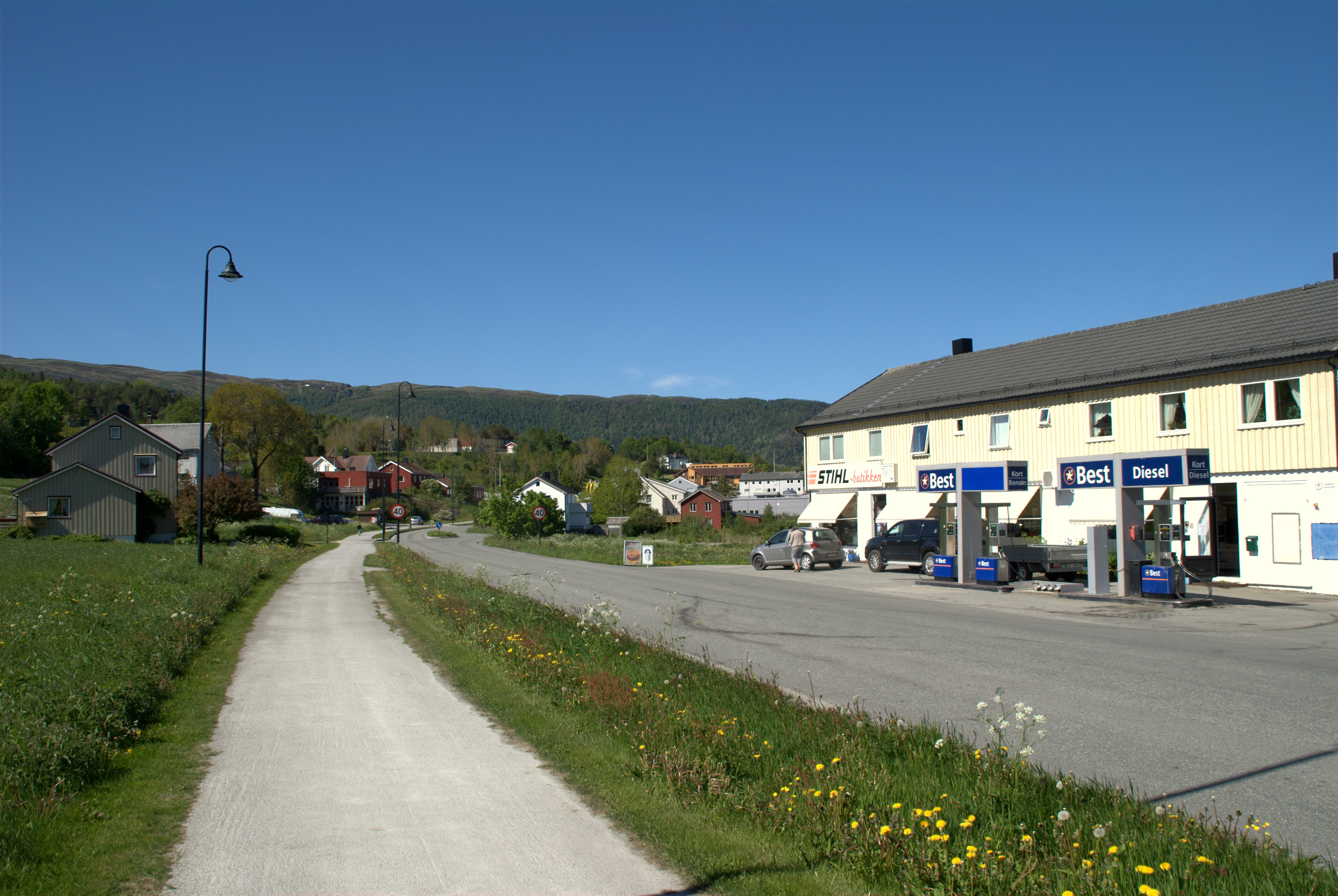 Lensvika med Fylkesveg 710 i Agdenes i Sør-Trøndelag.